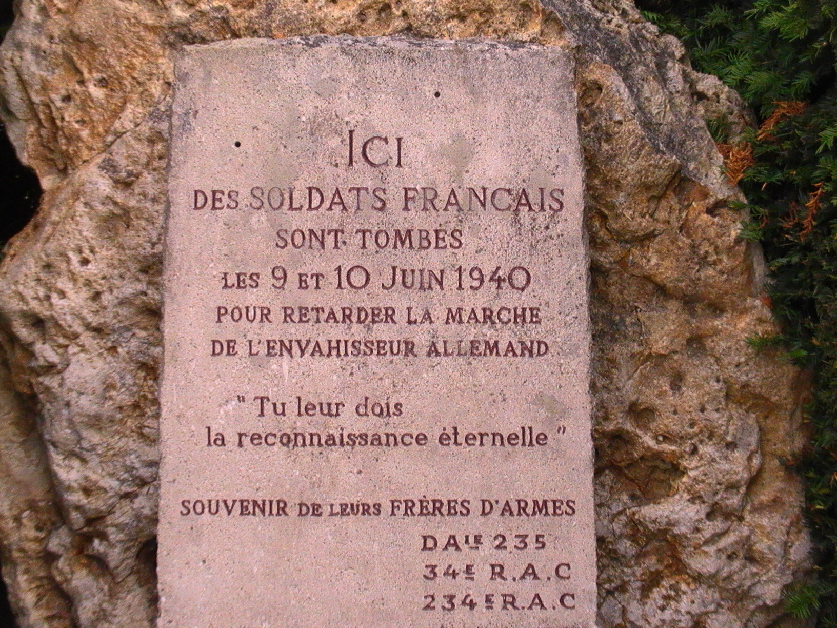 Mémorial des journées des 9 et 10 juin 1940 - Inaugurée le 12 juin 1966.